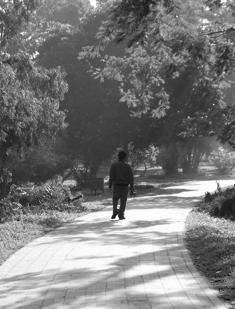 Romna park, Dhaka, Bangladesh.